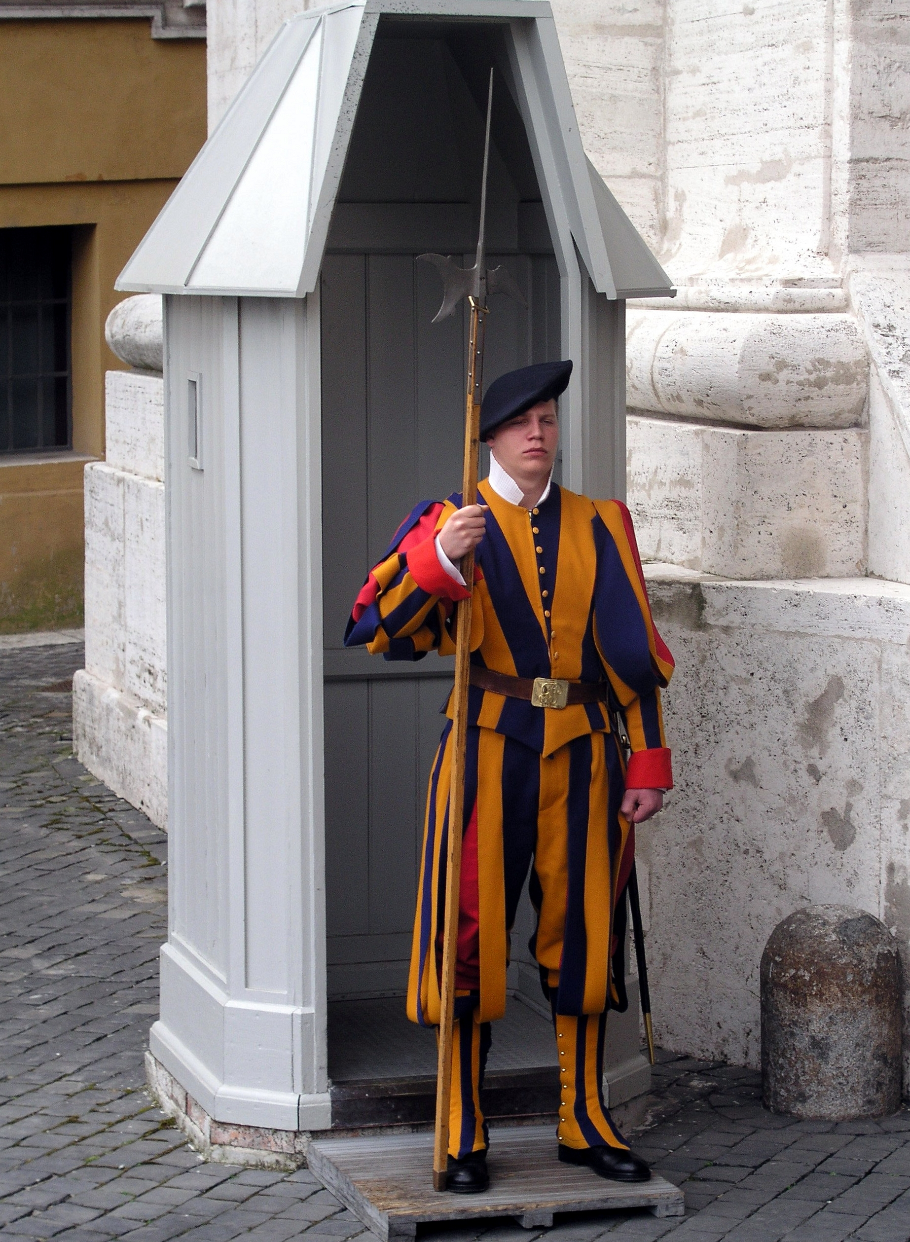 Rom, Vatikan, Soldat der Schweizer Garde